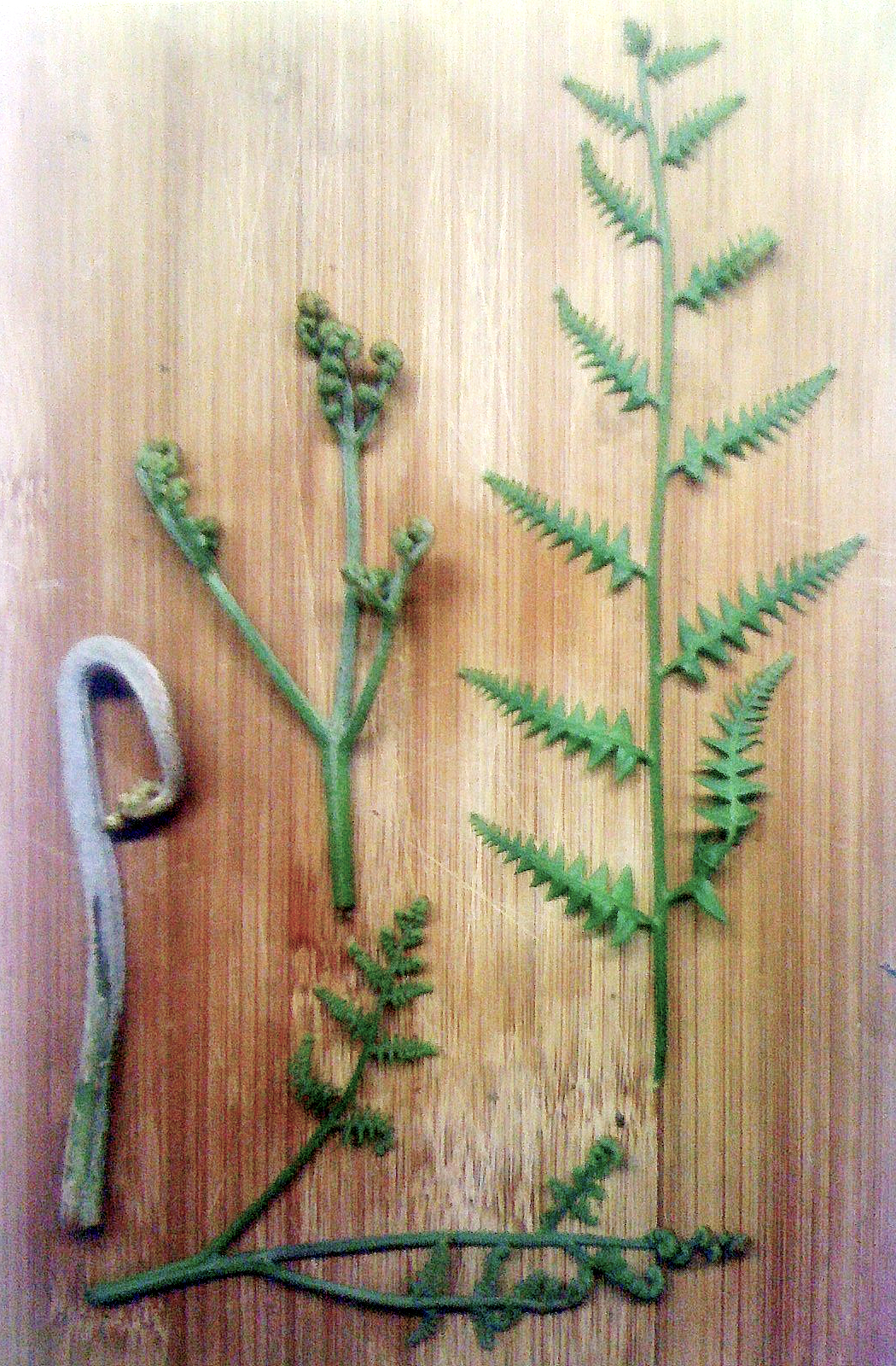 Fougère un peu plus tardive que la fougère autruche.